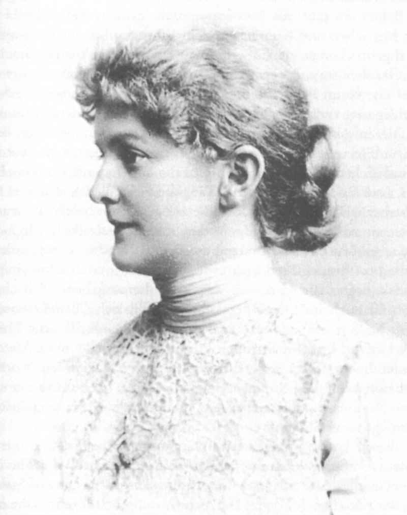 Bildbeschreibung: Marie von Sivers